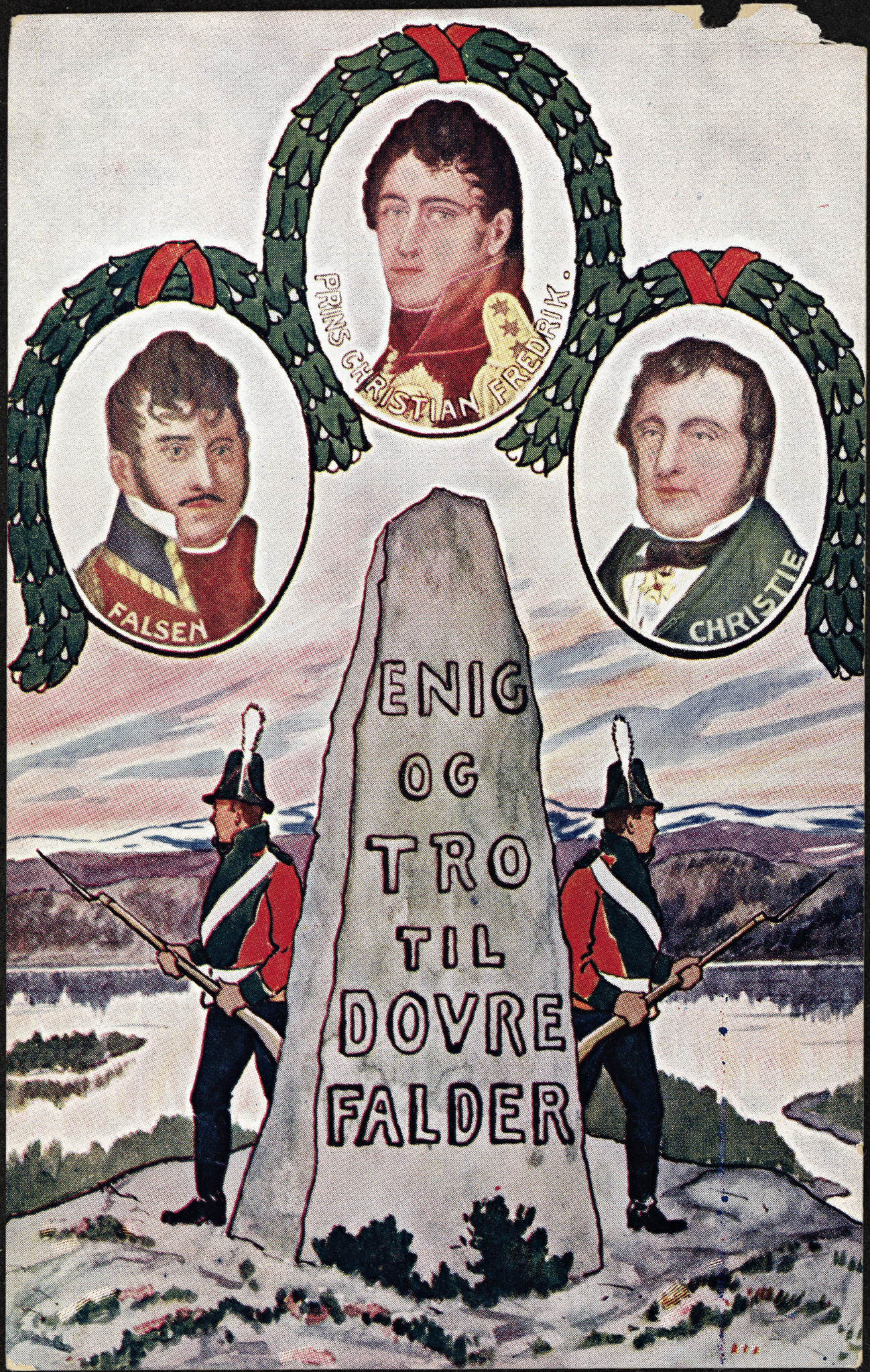 Tittel / Title: Enig og Tro til Dovre falder Beskrivelse / Description: Postkort. Kunstner / Artist: ukjent / unknown Utgiver / Publisher: C. A. Erichsen (Christiania) Utgitt / Published: 1914 Eier / Owner Institution: Nasjonalbiblioteket / National Library of Norway Lenke / Link: Bildesignatur / Image Number: blds_05718